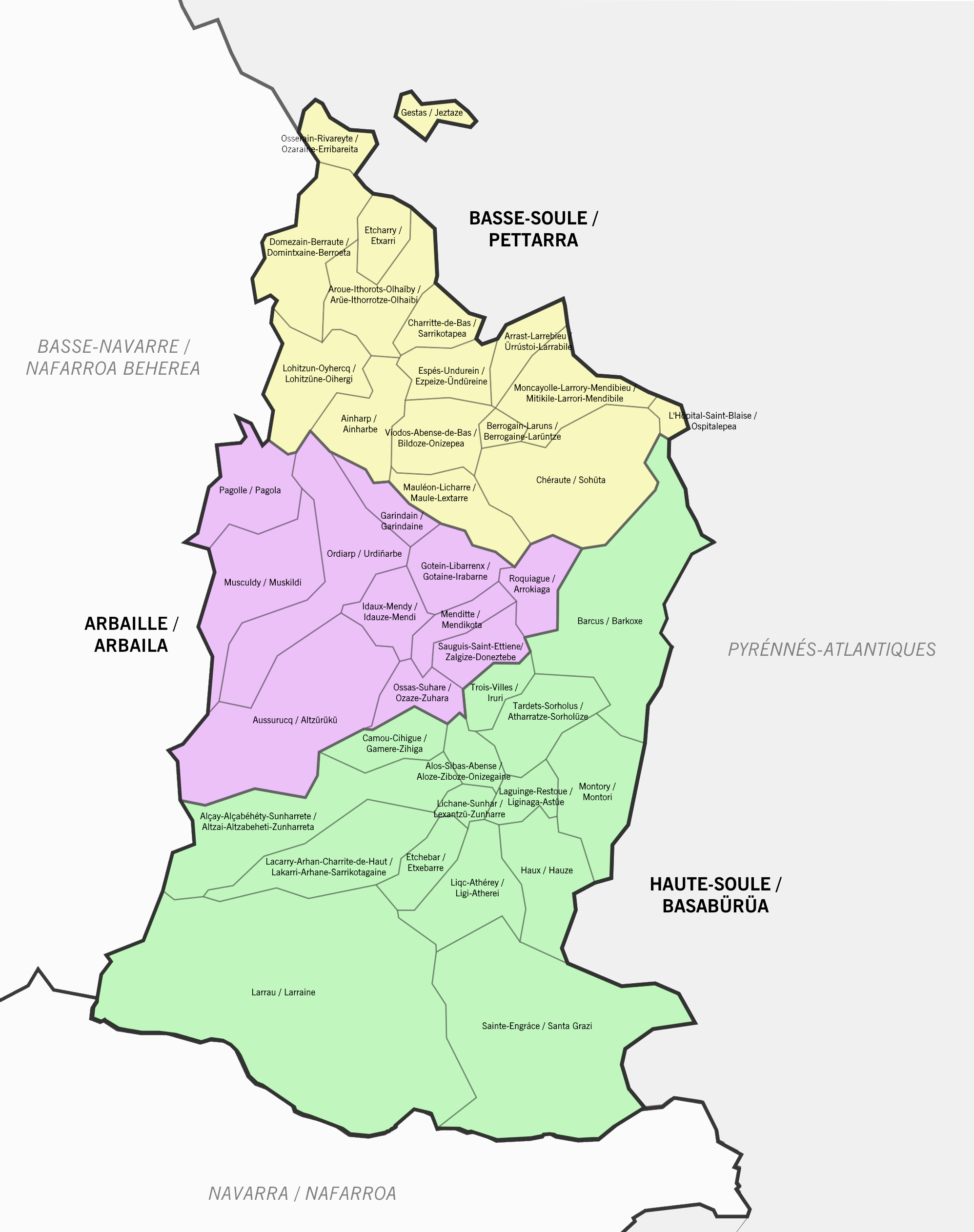 Mapa de Zuberoa